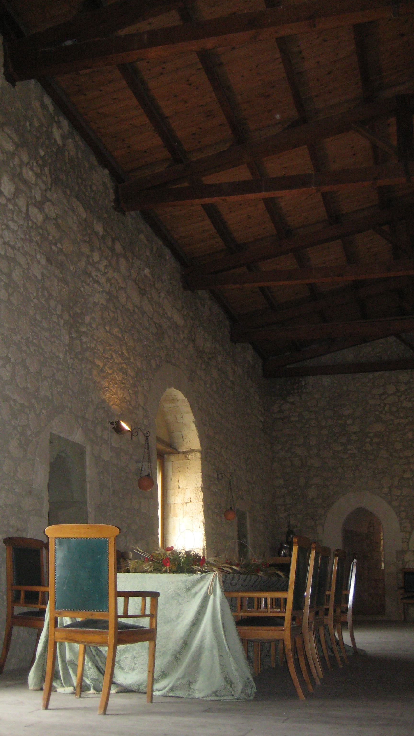 Sala interna del castello di Mussomeli (o Castello Manfredonico), a Mussomeli (provincia di Caltanissetta, Sicilia)